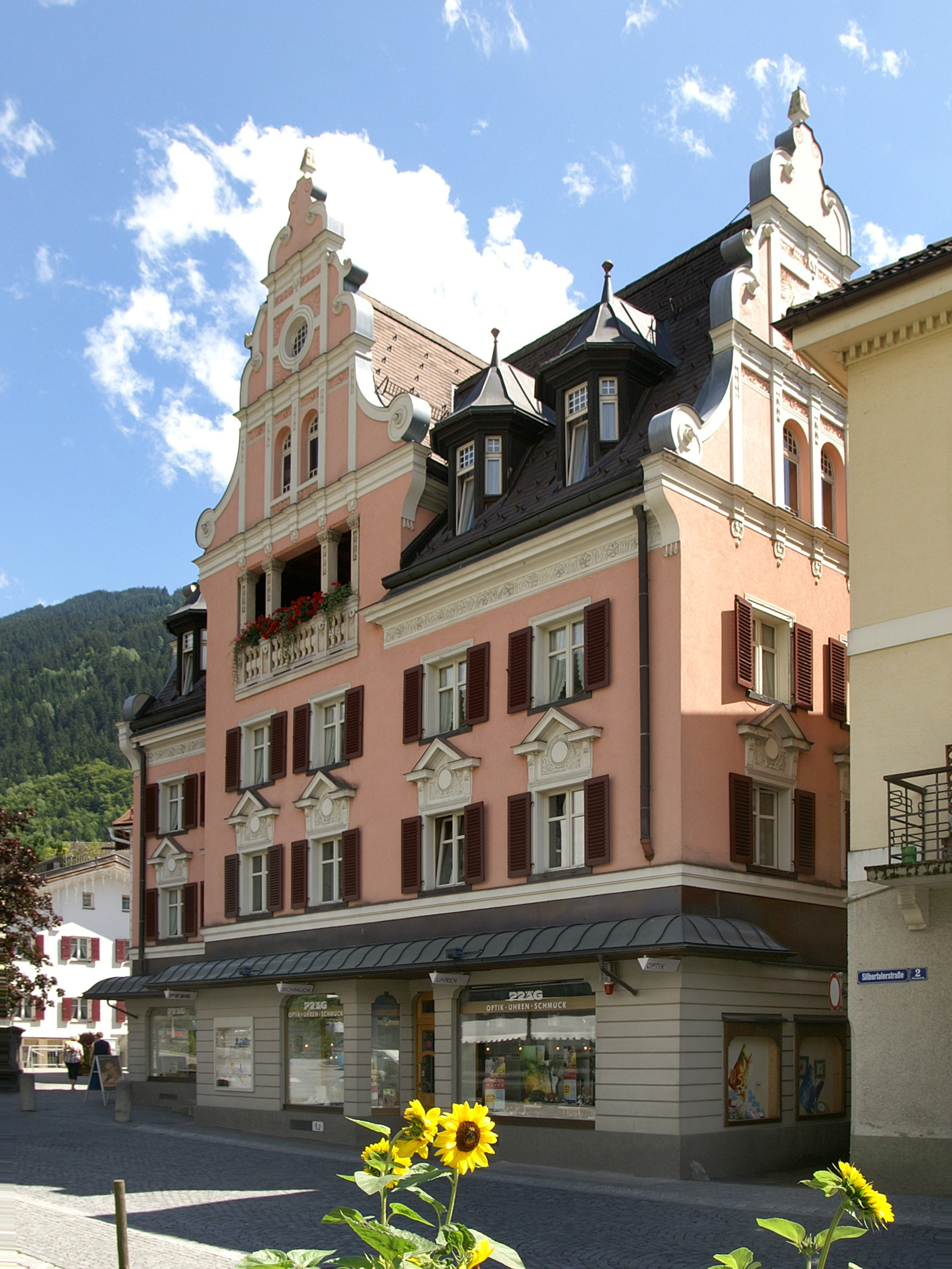 Haus Maklott, Umbau (um 1900) Auftraggeber Peter Franz Maklott, Kolonialwarenhändler, Silbertalerstrasse 4 in Schruns Montafon, Architekt Hanns Kornberger, Jugendstil und romantischer Späthistorismus